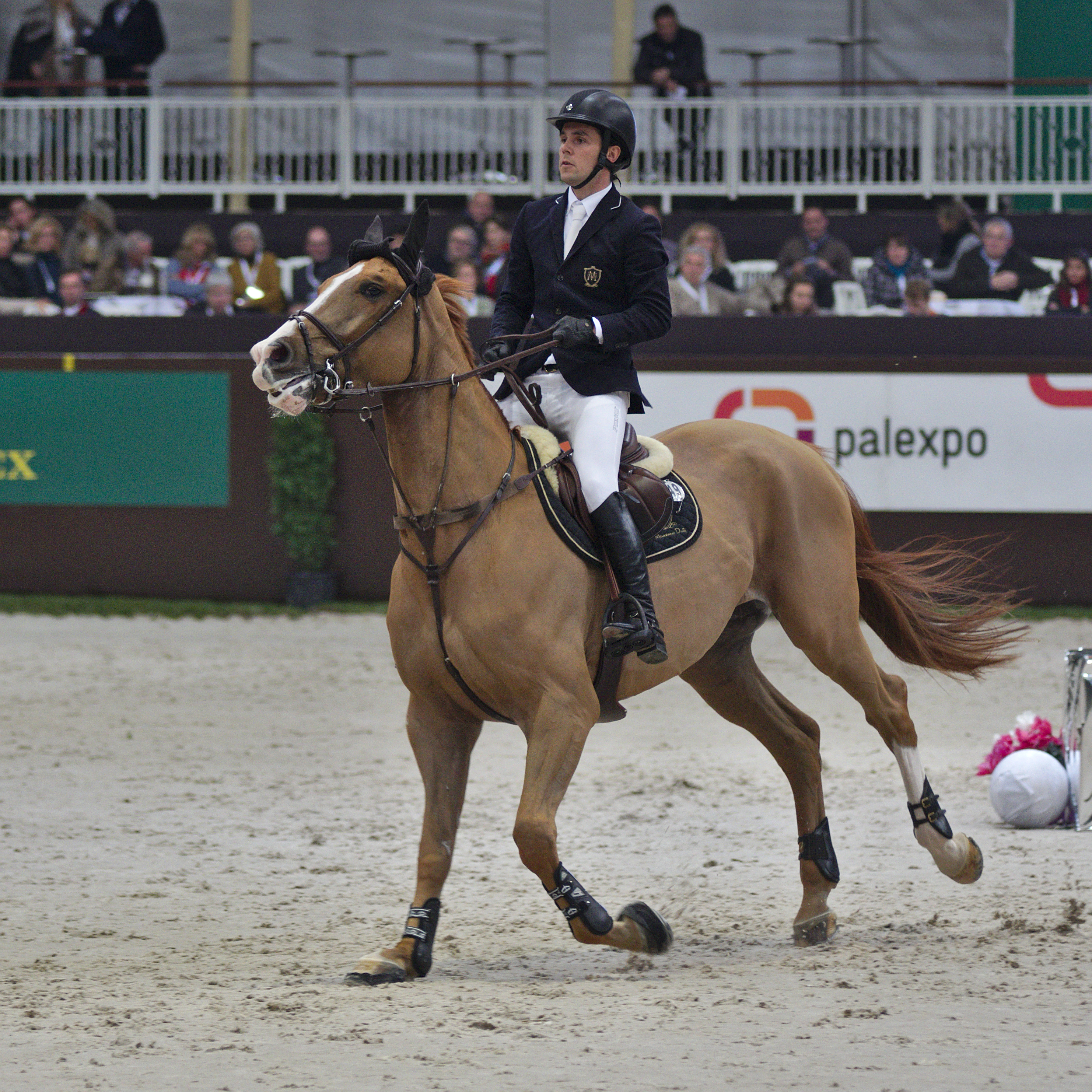 CHI Genève 2013 - 20131212 - Sergio Alvarez Moya et Zipper